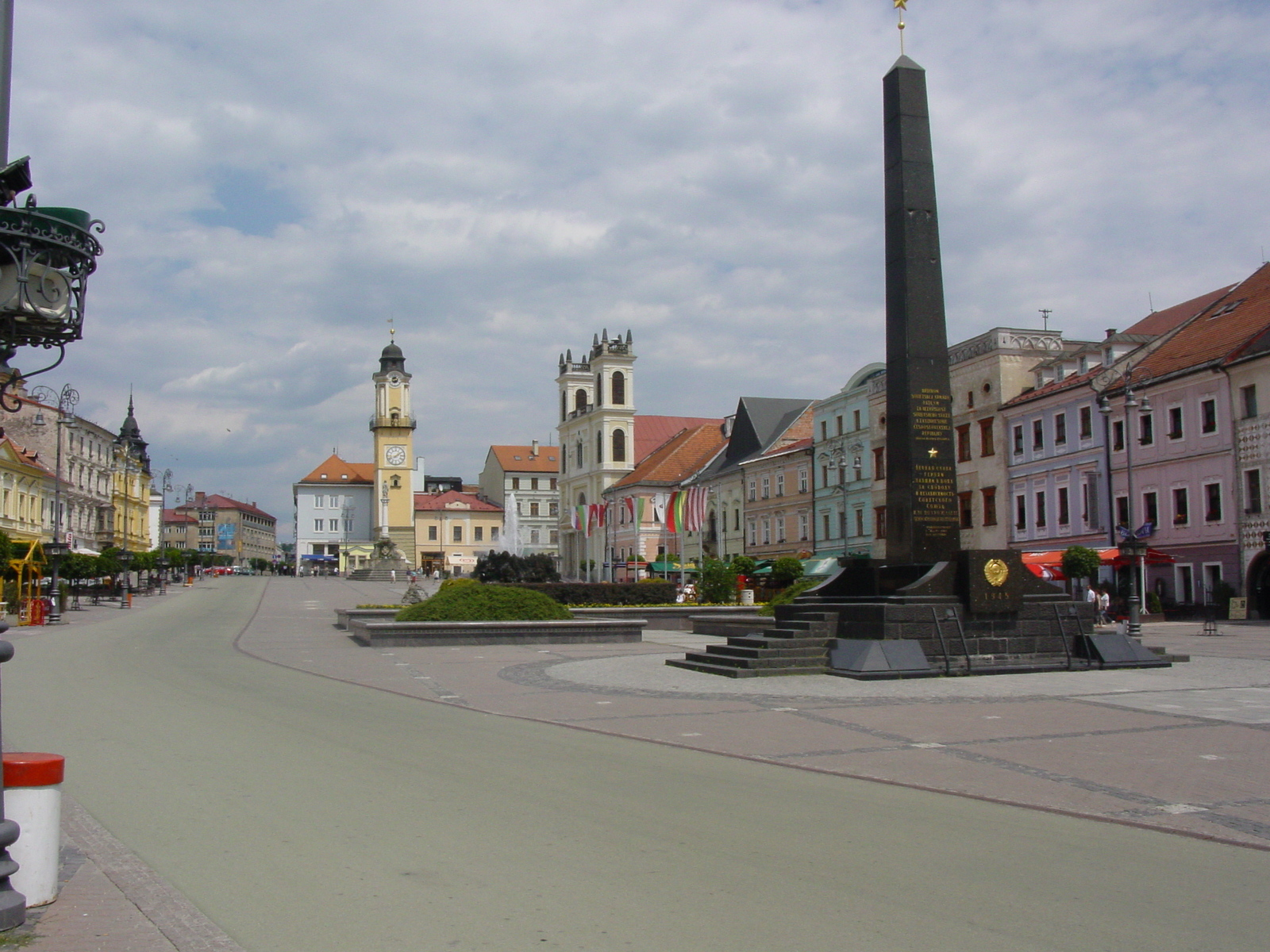 Banska Bystrica Stako July 2003